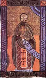 Изображение Нерсеса Ламбронаци